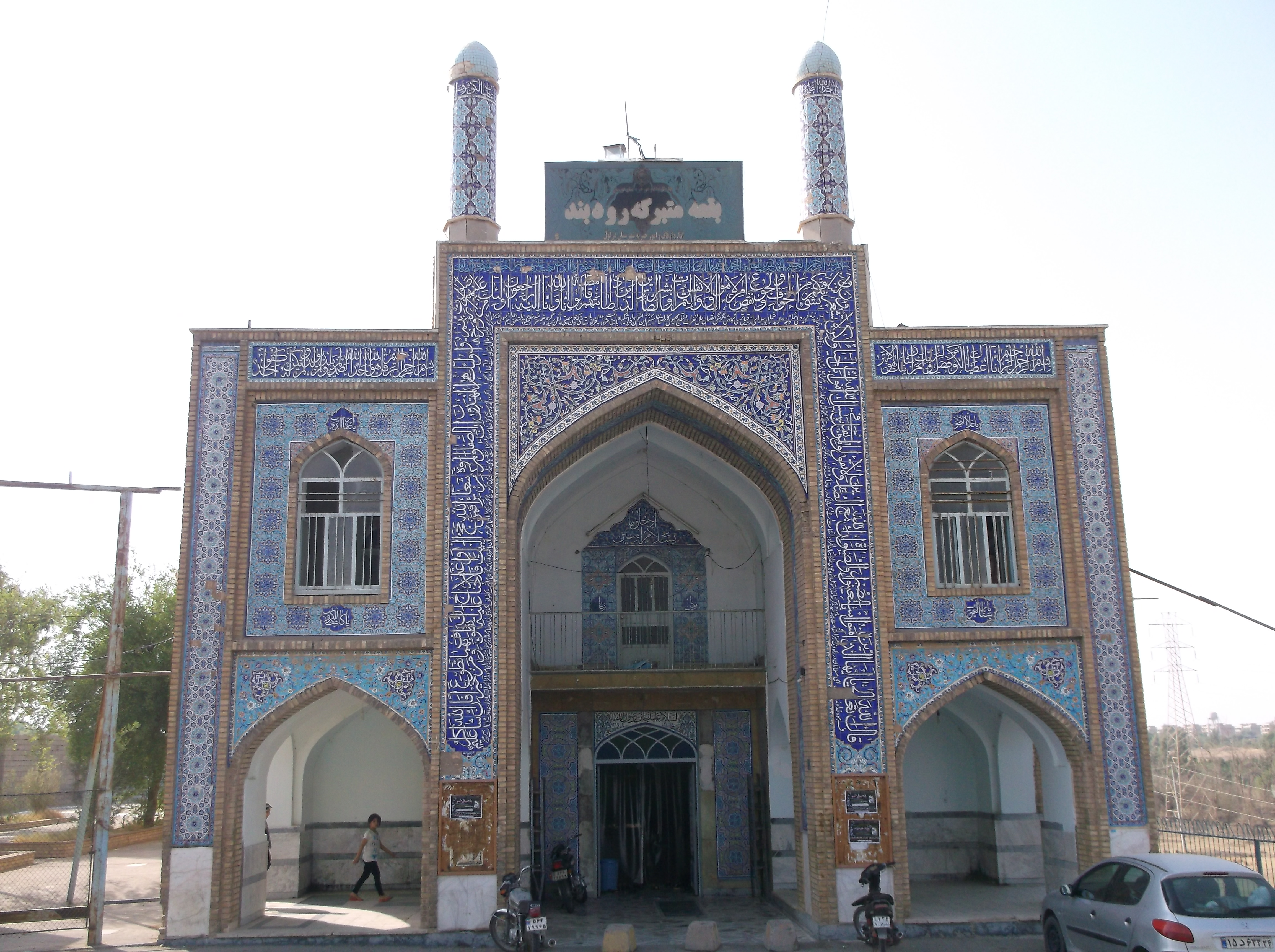 آرامگاه رود بند